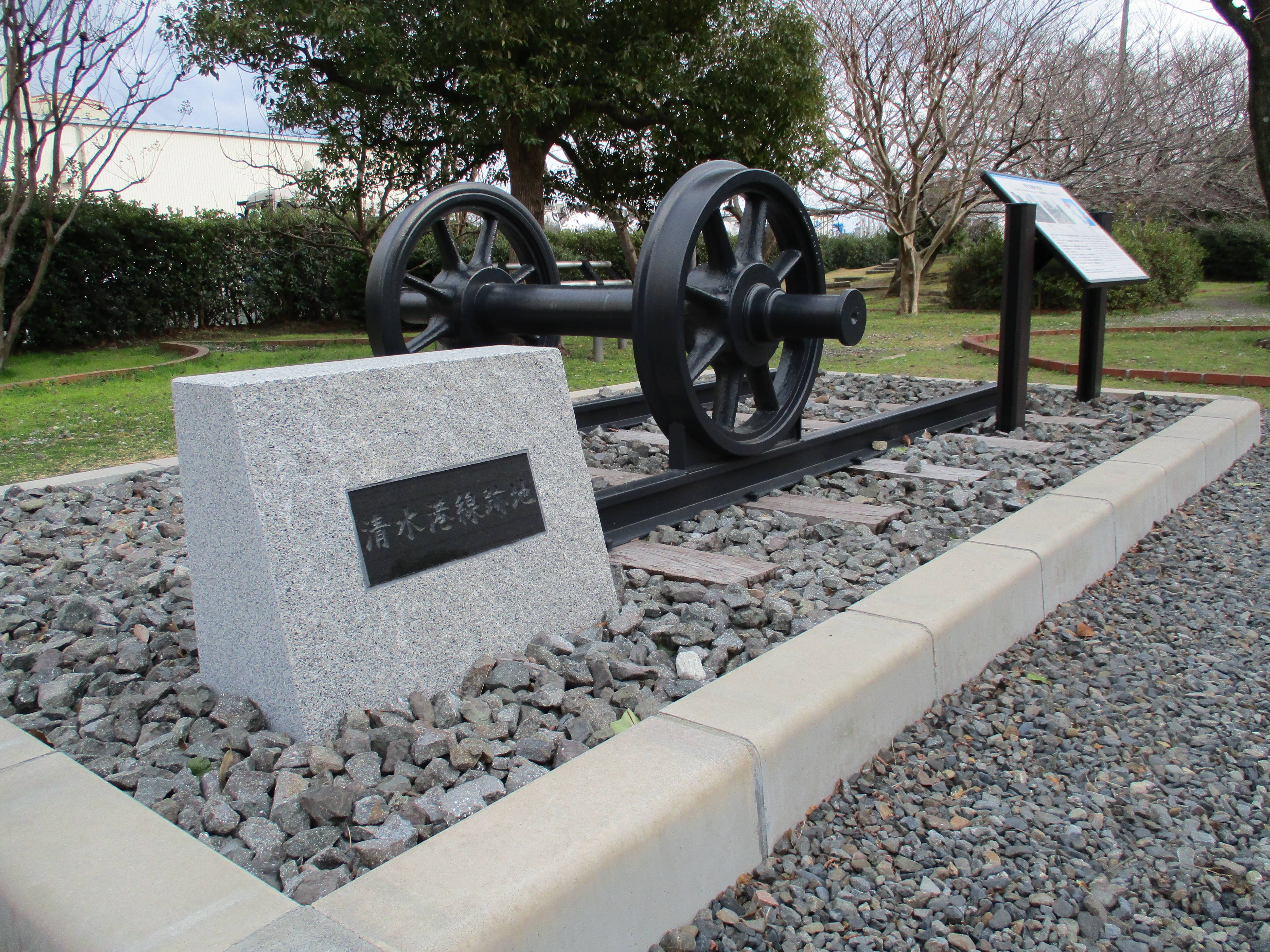 清水港線跡地のモニュメント。